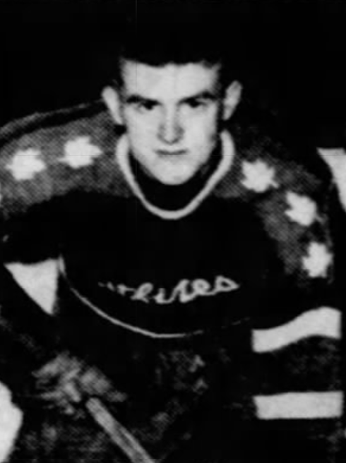 Max Quackenbush, ca 1948